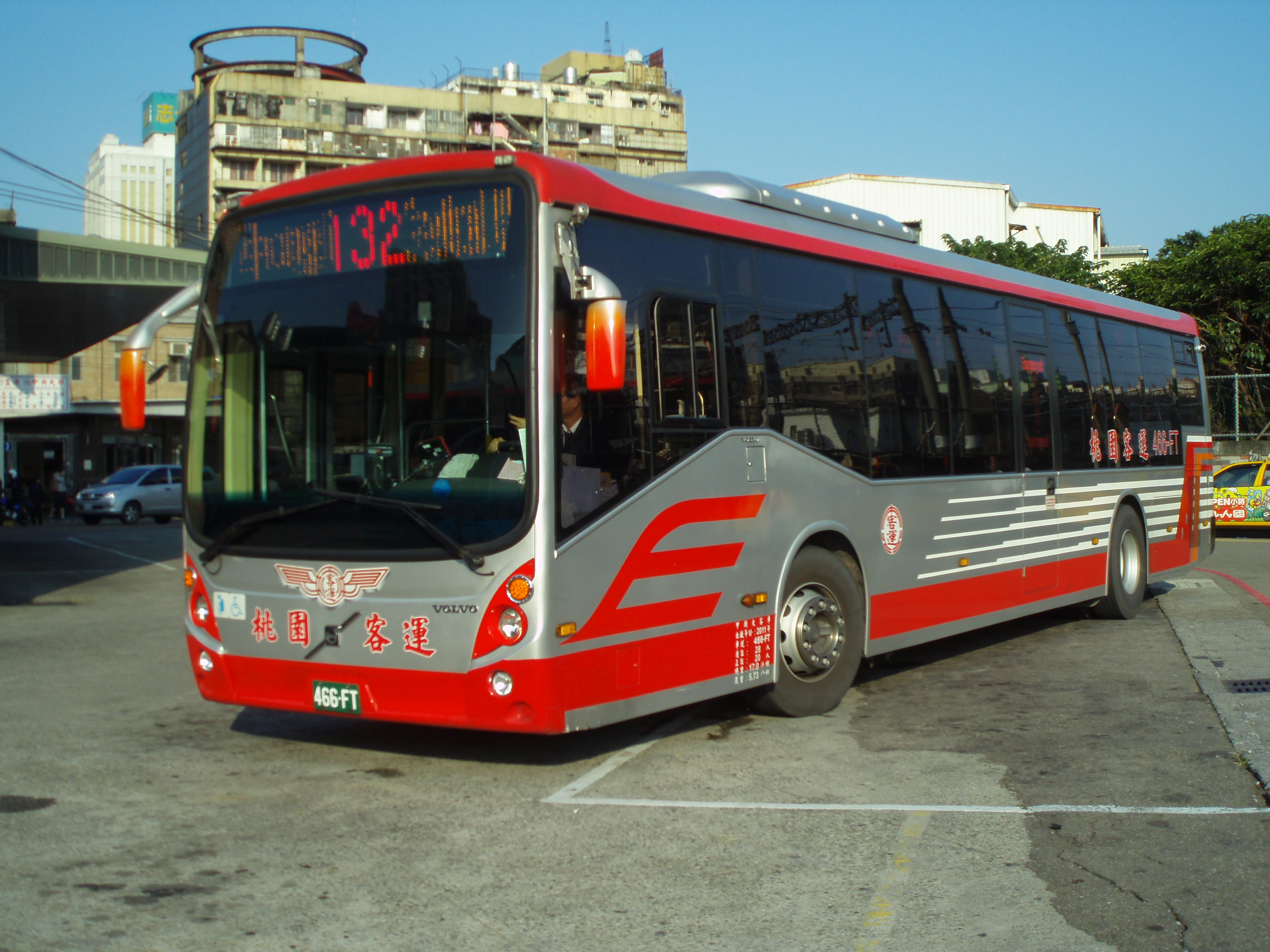 桃園客運第一代VOLVO低底盤公車466-FT，車身由唐榮車體打造。